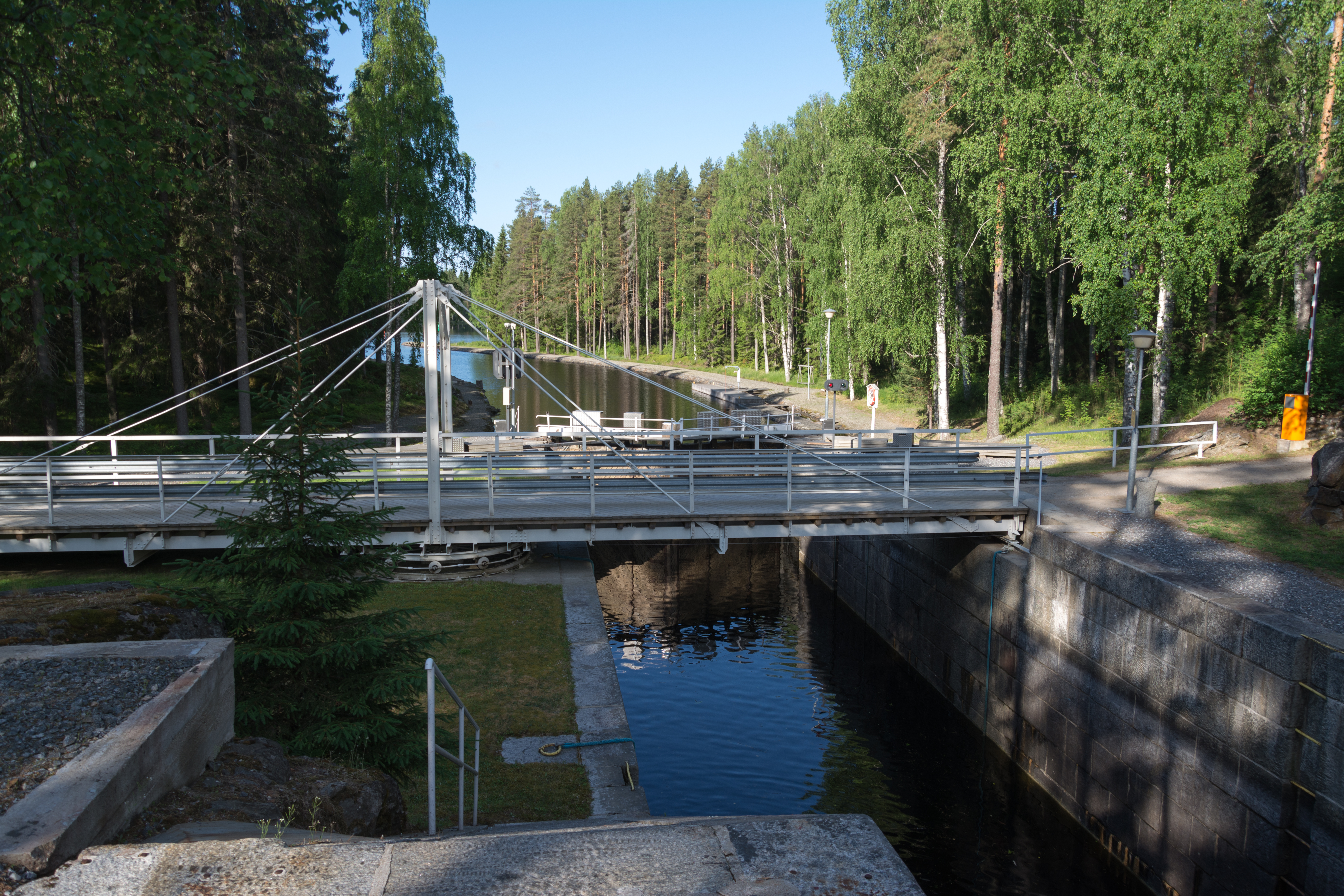 Taivallahden kanava Heinävedellä